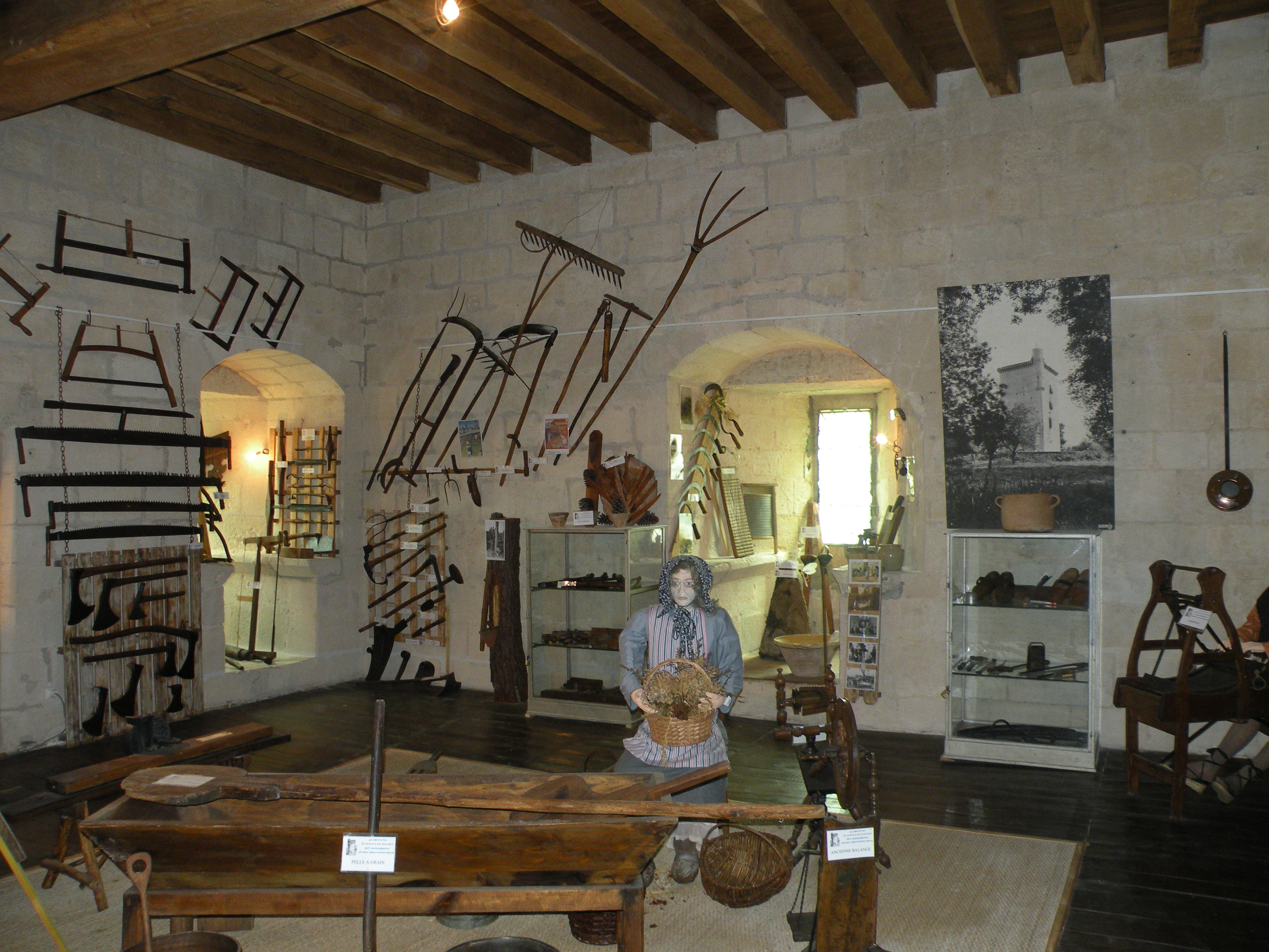 intérieur Tour de l'Honneur